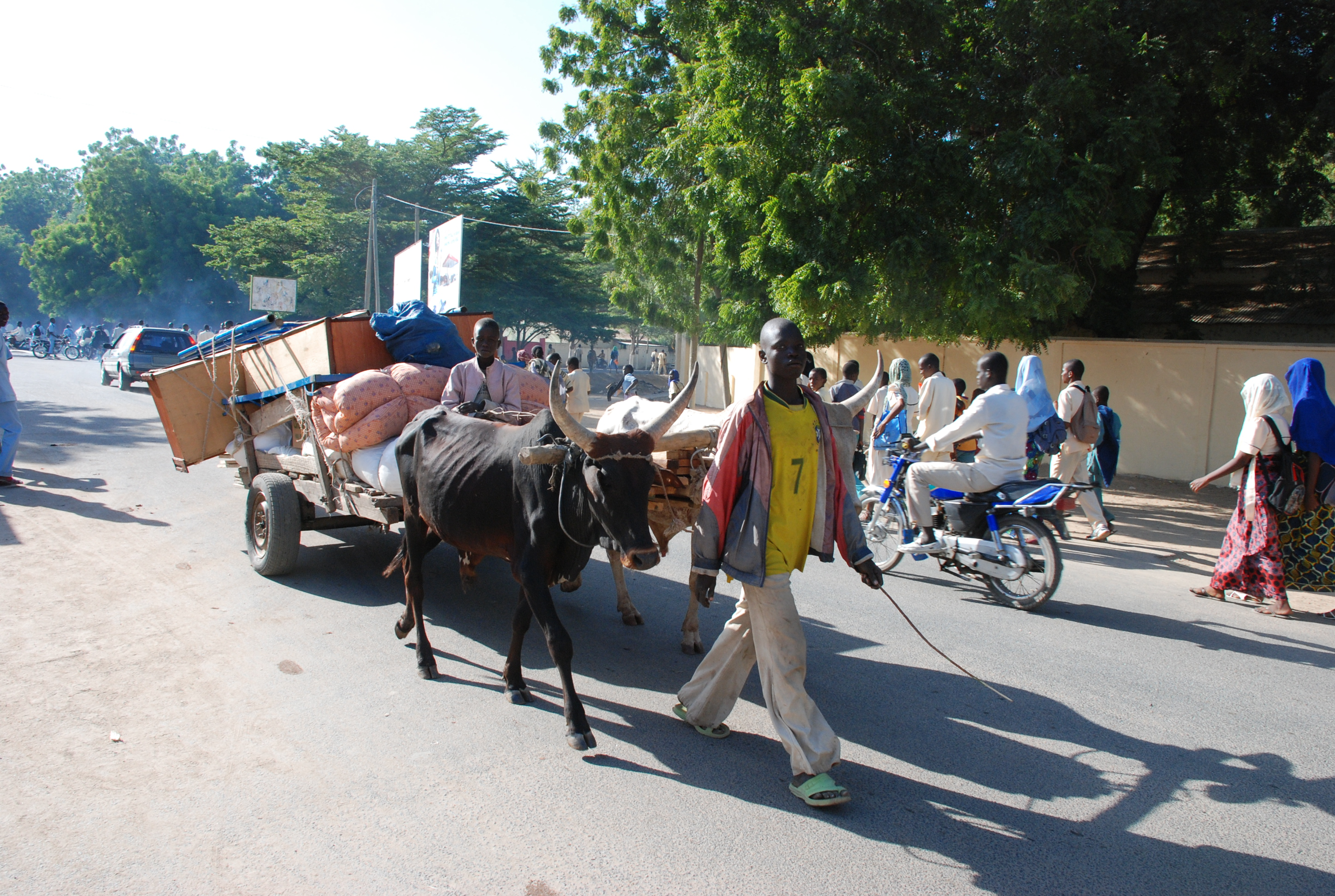 Déplacement des populations dans la ville de Garoua au Cameroun This is an image with the theme "Africa on the Move or Transport" from: Cameroon